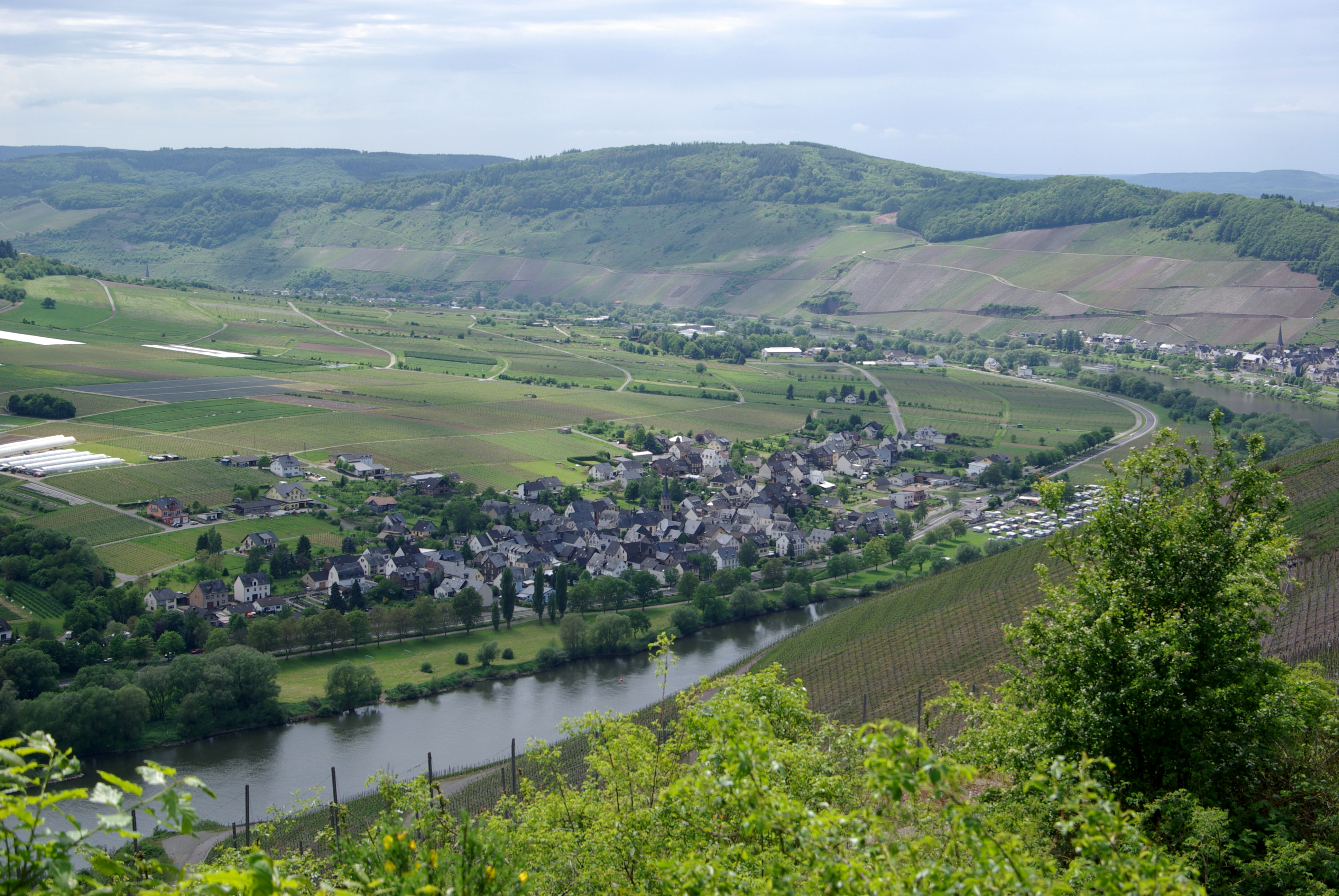 Erden